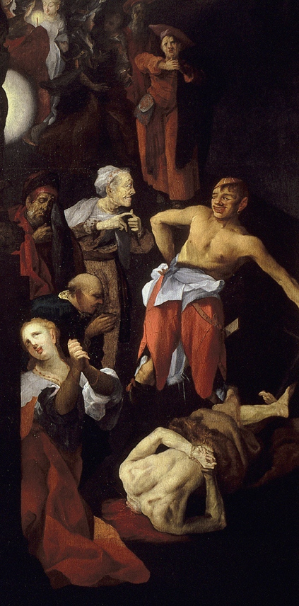 Detail